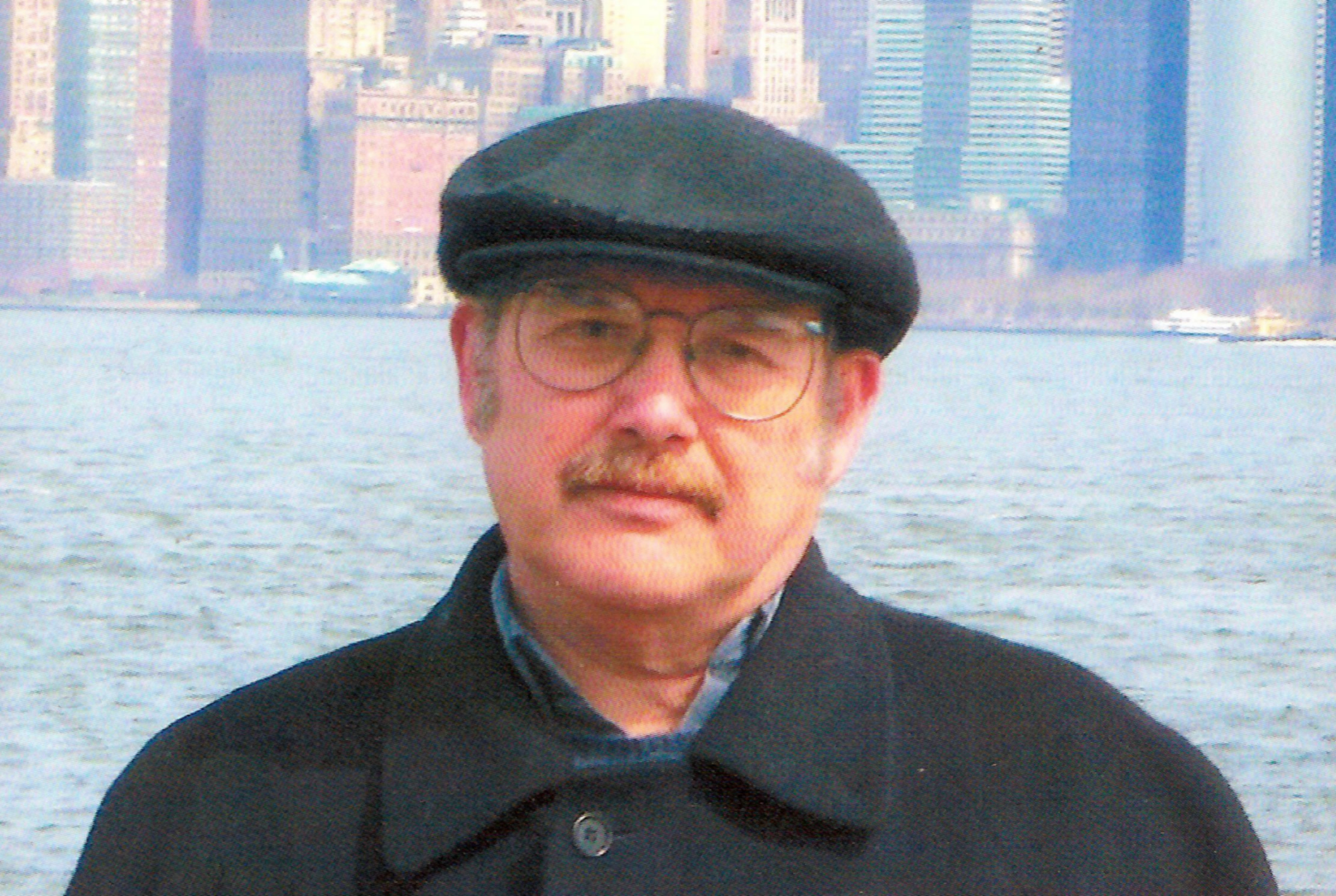 Francisco Amparán en uno de sus viajes familiares a la ciudad de Nueva York